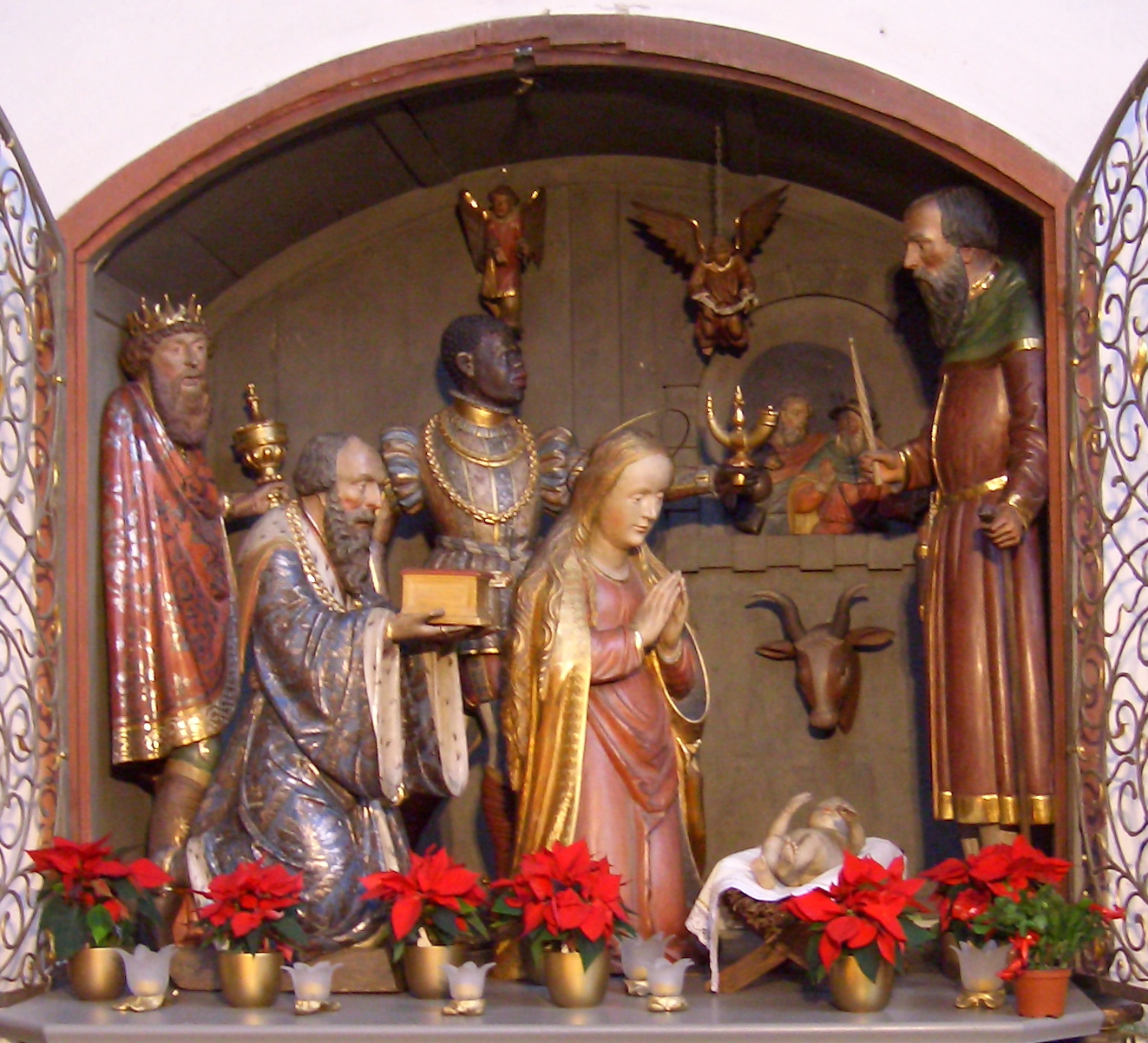 Dom in Augsburg, Krippendarstellung, Schwaben Mitte 16. Jh.